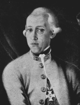 Wilhelm von Wartensleben (1734-1798), feldzeugmeister des armées autrichiennes. Grièvement atteint à la bataille d'Emmendingen le 19 octobre 1796, il meurt des suites de ses blessures à Vienne le 21 avril 1798.